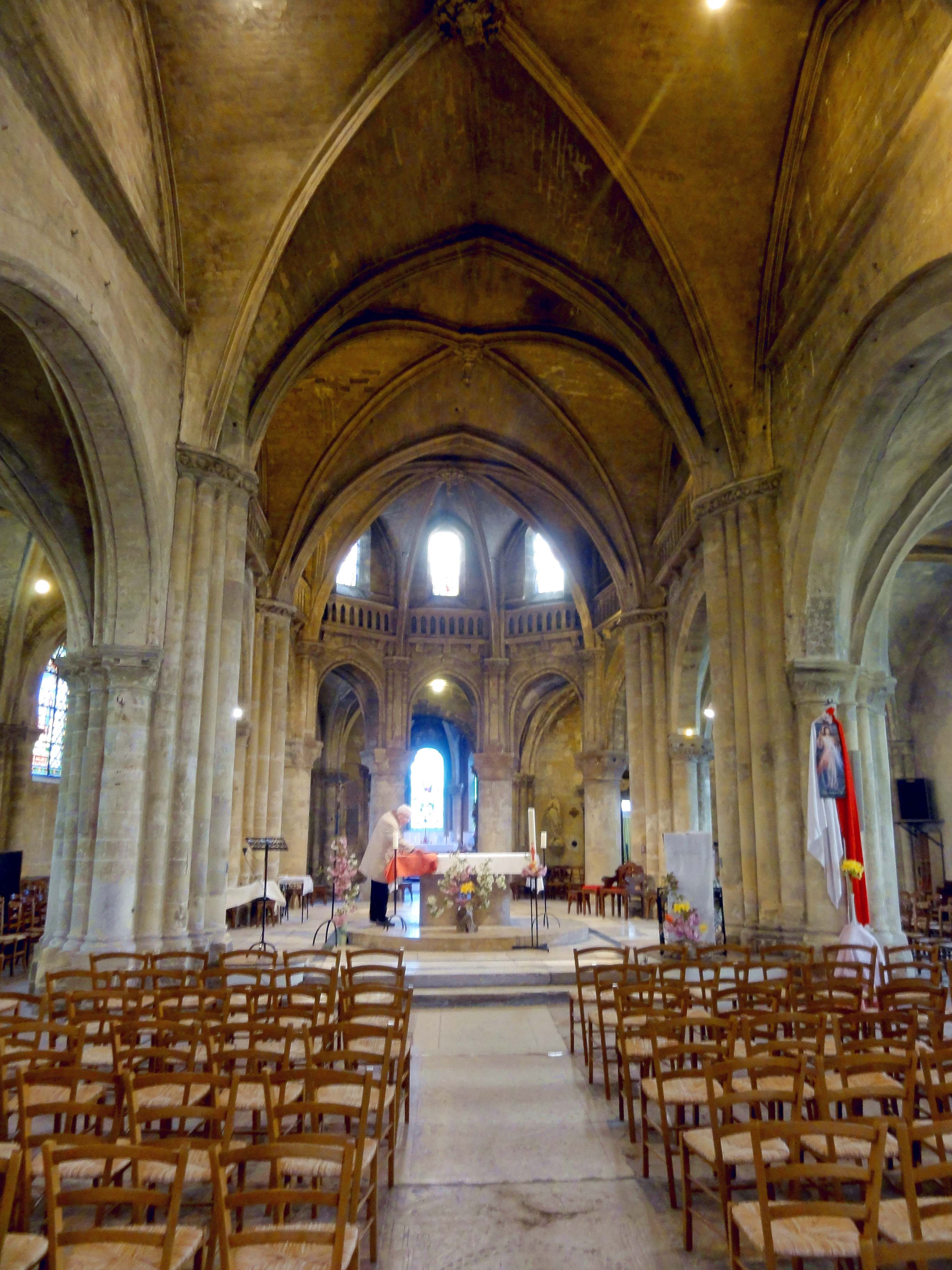 Intérieur de l'église - voir titre.